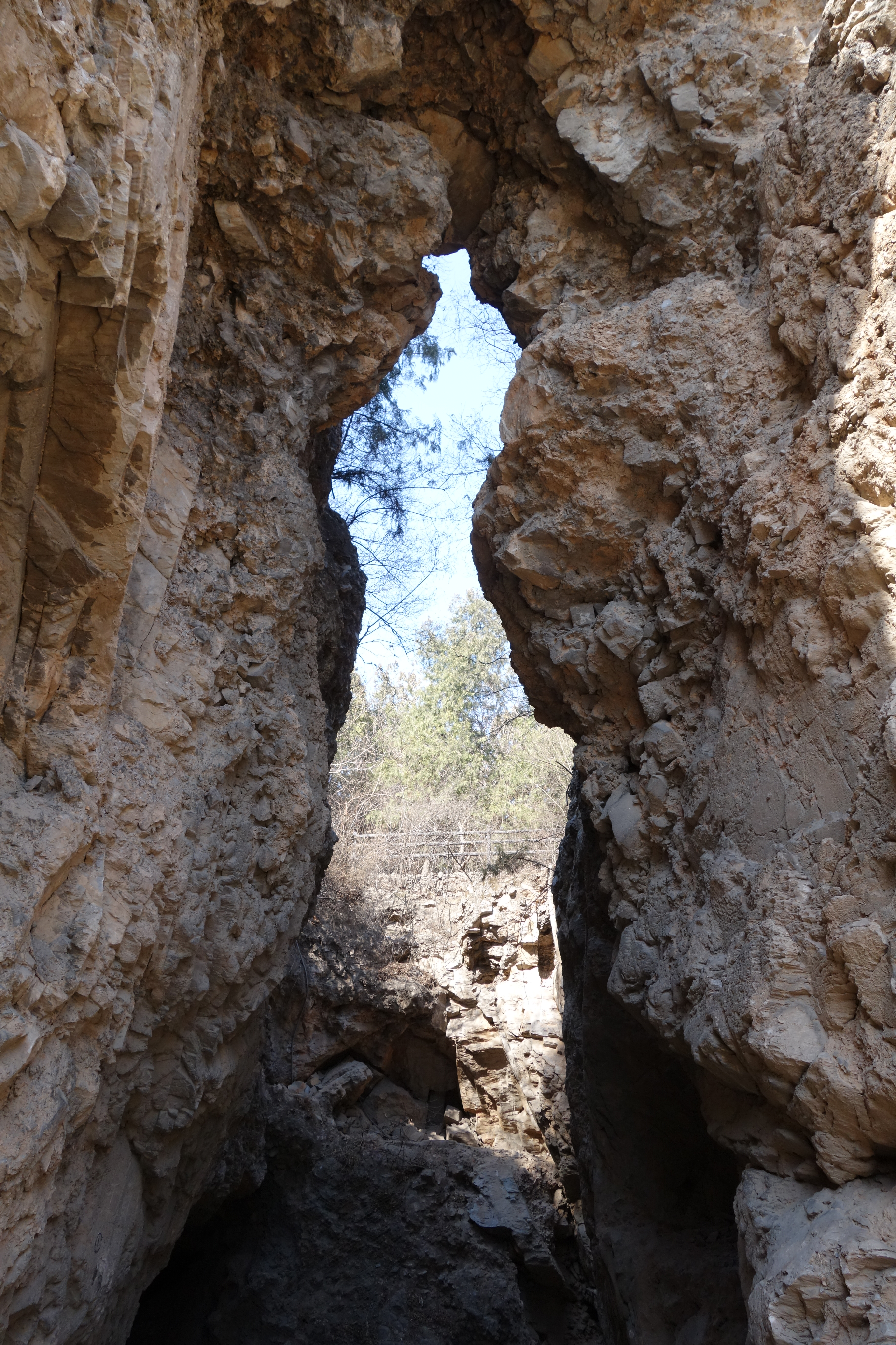 周口店第4地点